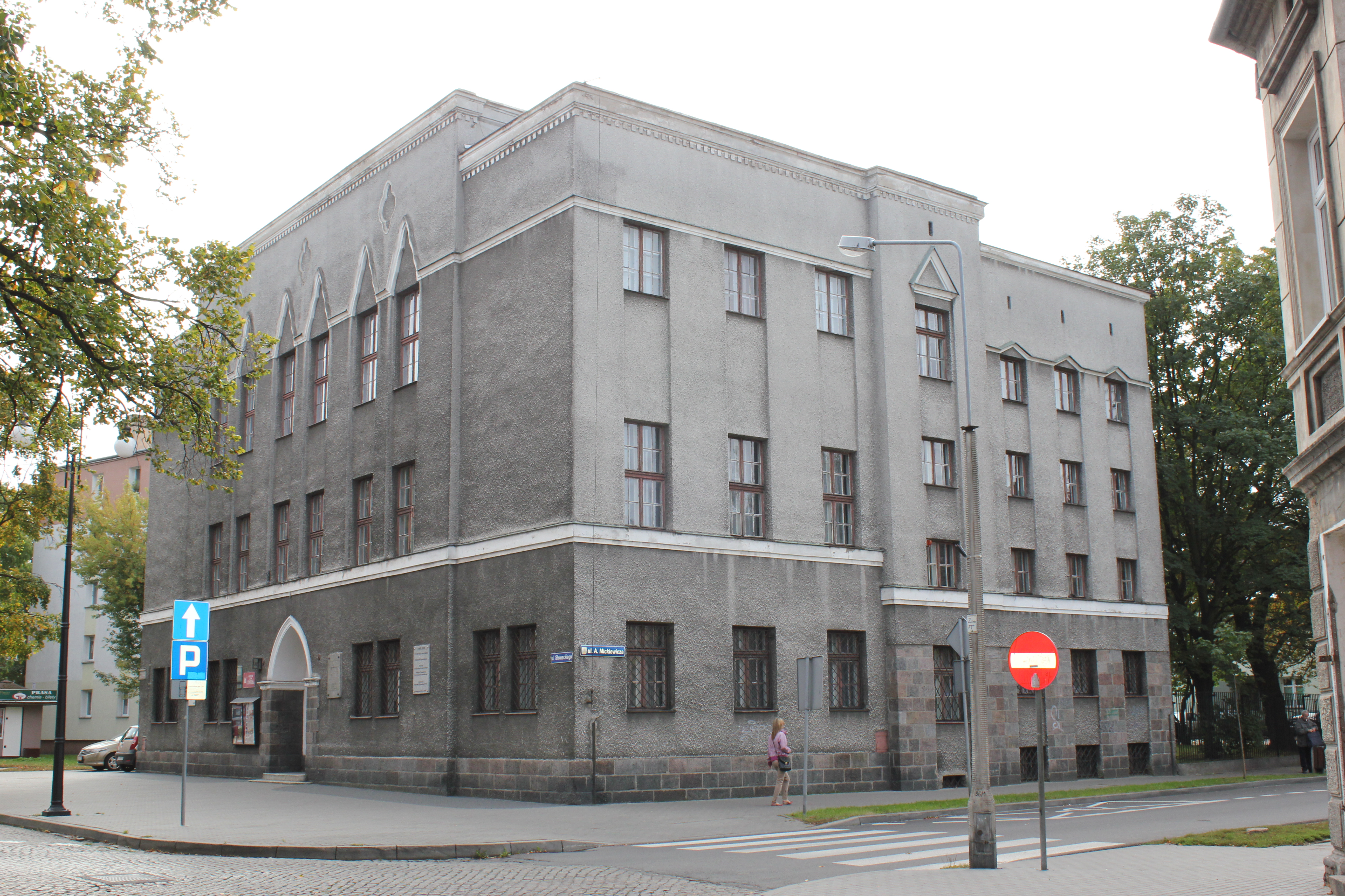 Muzeum Kujawskie, ob. Muzeum Ziemi Kujawskiej i Dobrzyńskiej, 1925-1930 Włocławek, ul. Słowackiego 1a, miasto Włocławek